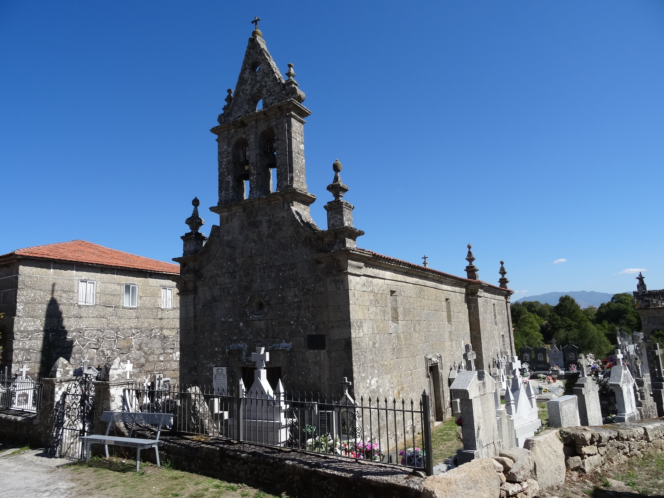 Ver título.